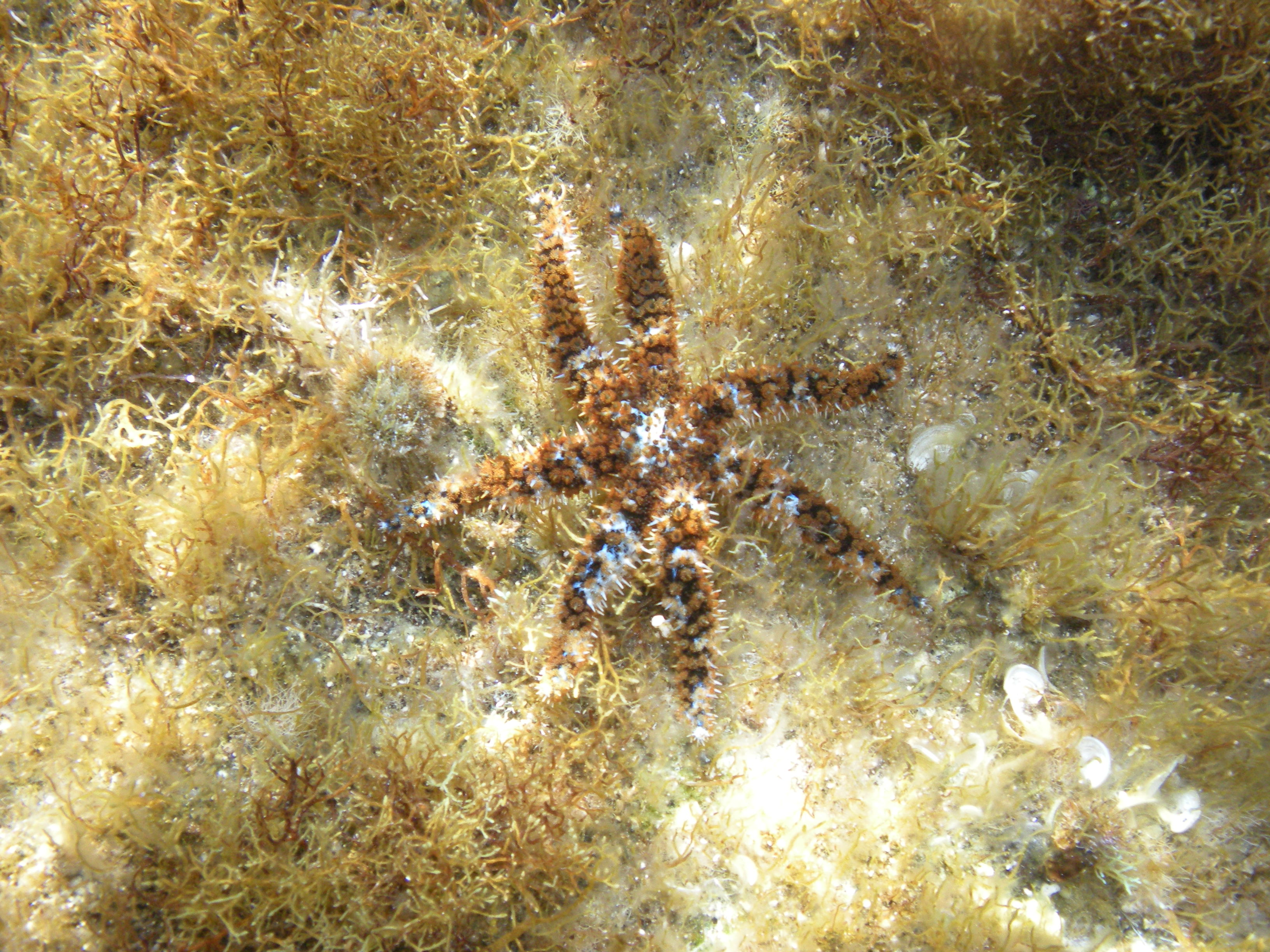 Coscinasterias tenuispina Linosa, Sicily